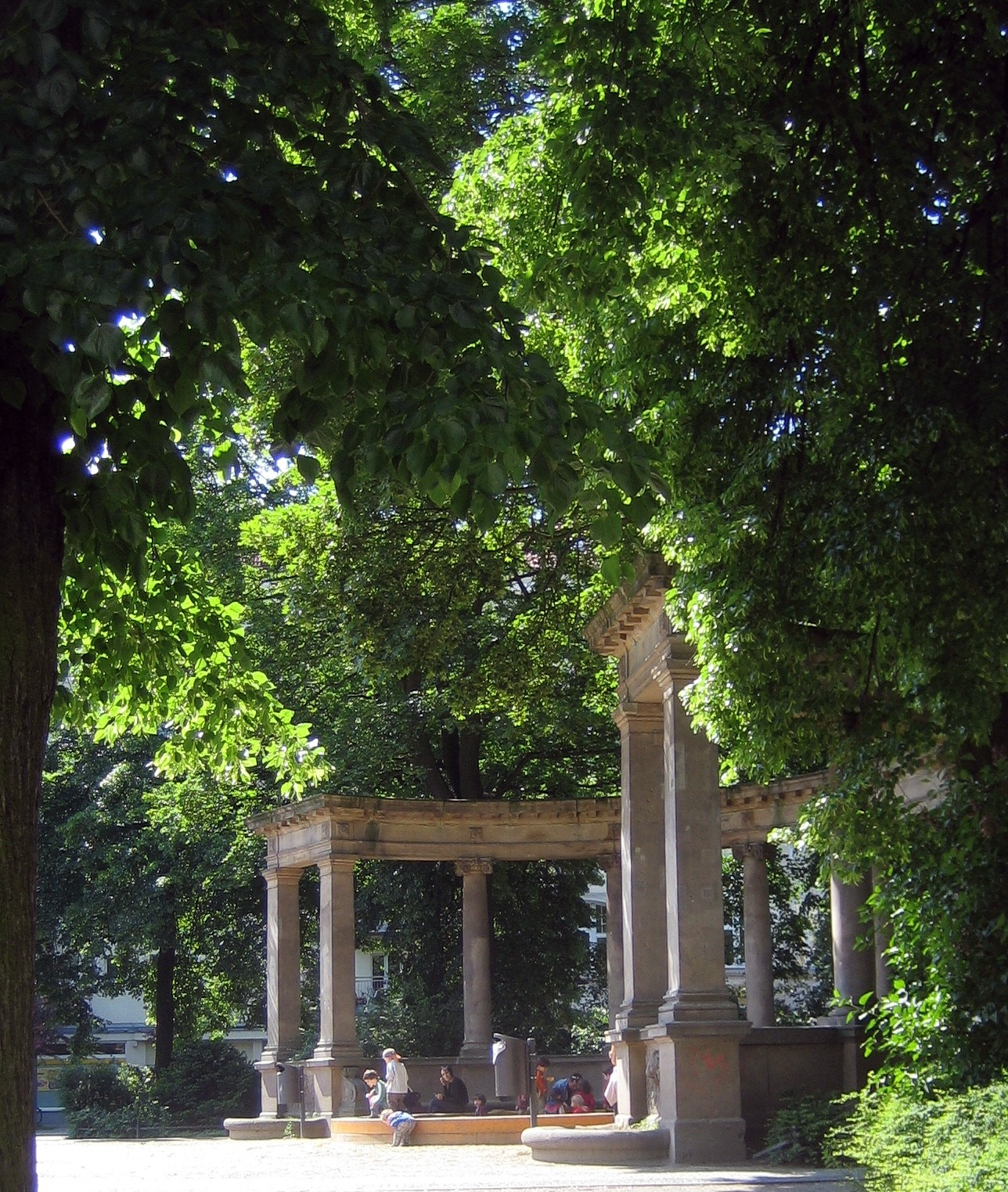 Victoria-Luise-Platz in Berlin-Schöneberg. Pergola und Spielplatz.